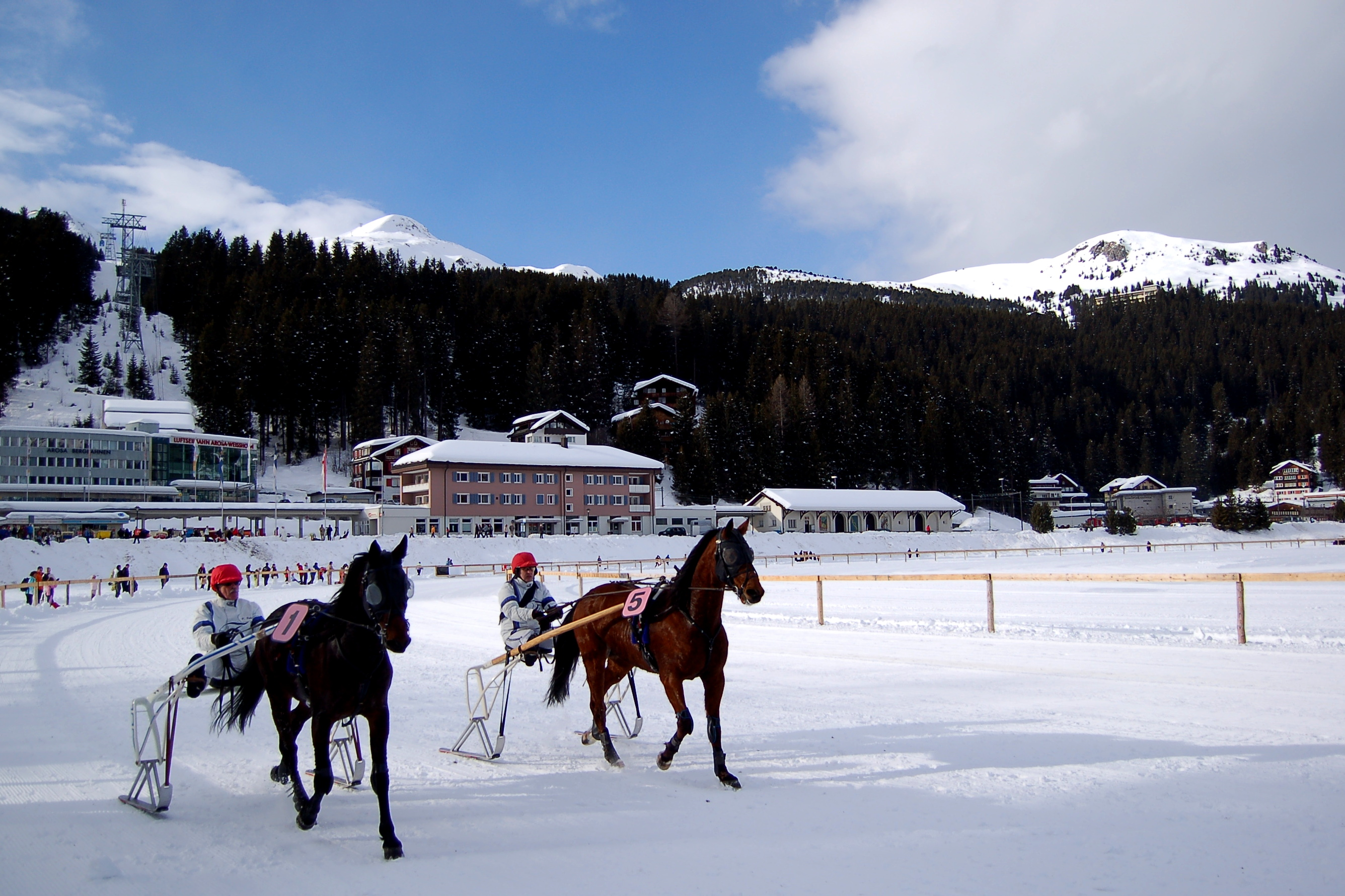 Perderennen Obersse Pferderennen Obersee Arosa Feb 2009